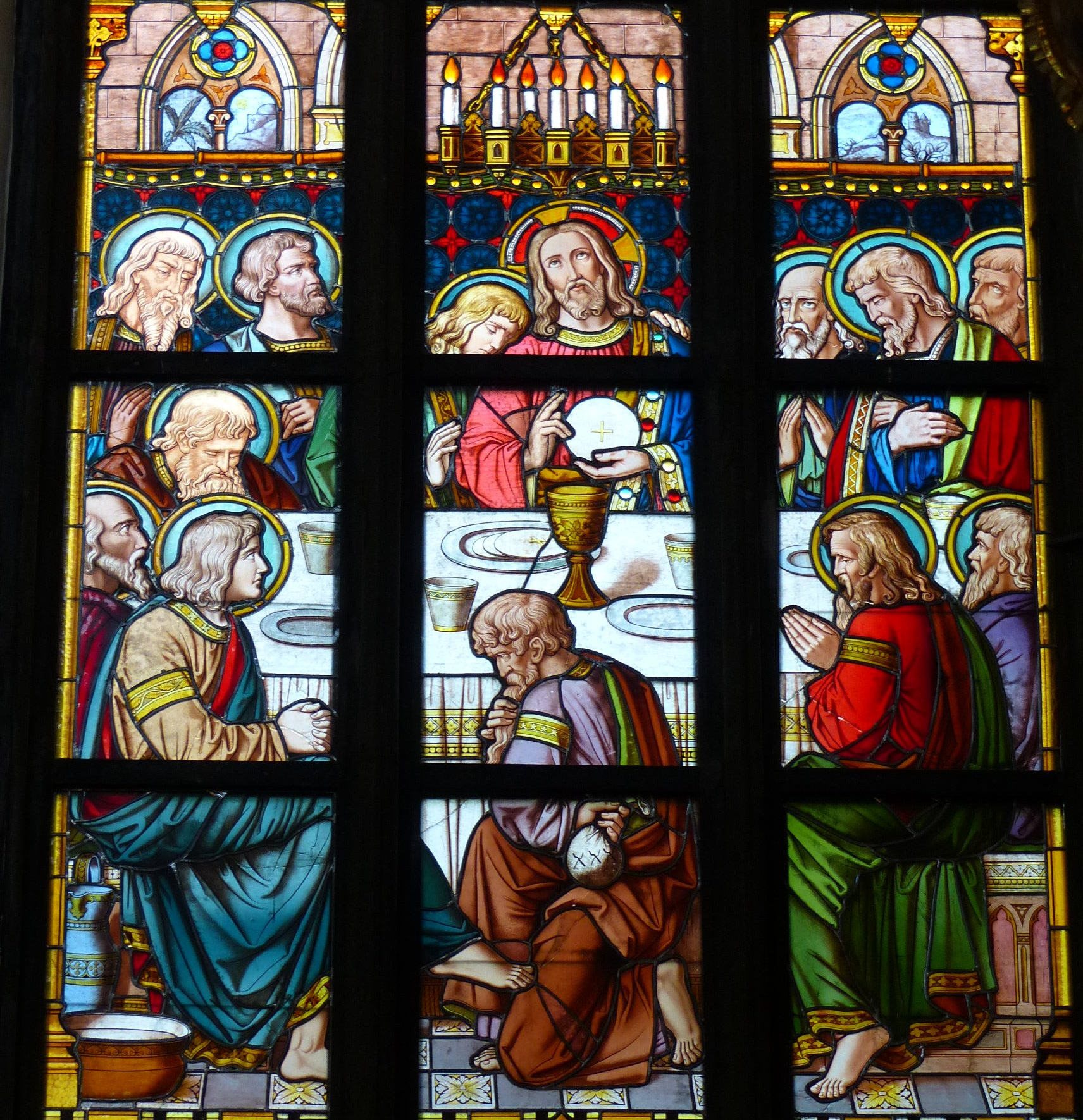 Toruń, Bazylika katedralna św. Jana Chrzciciela i św. Jana Ewangelisty w Toruniu